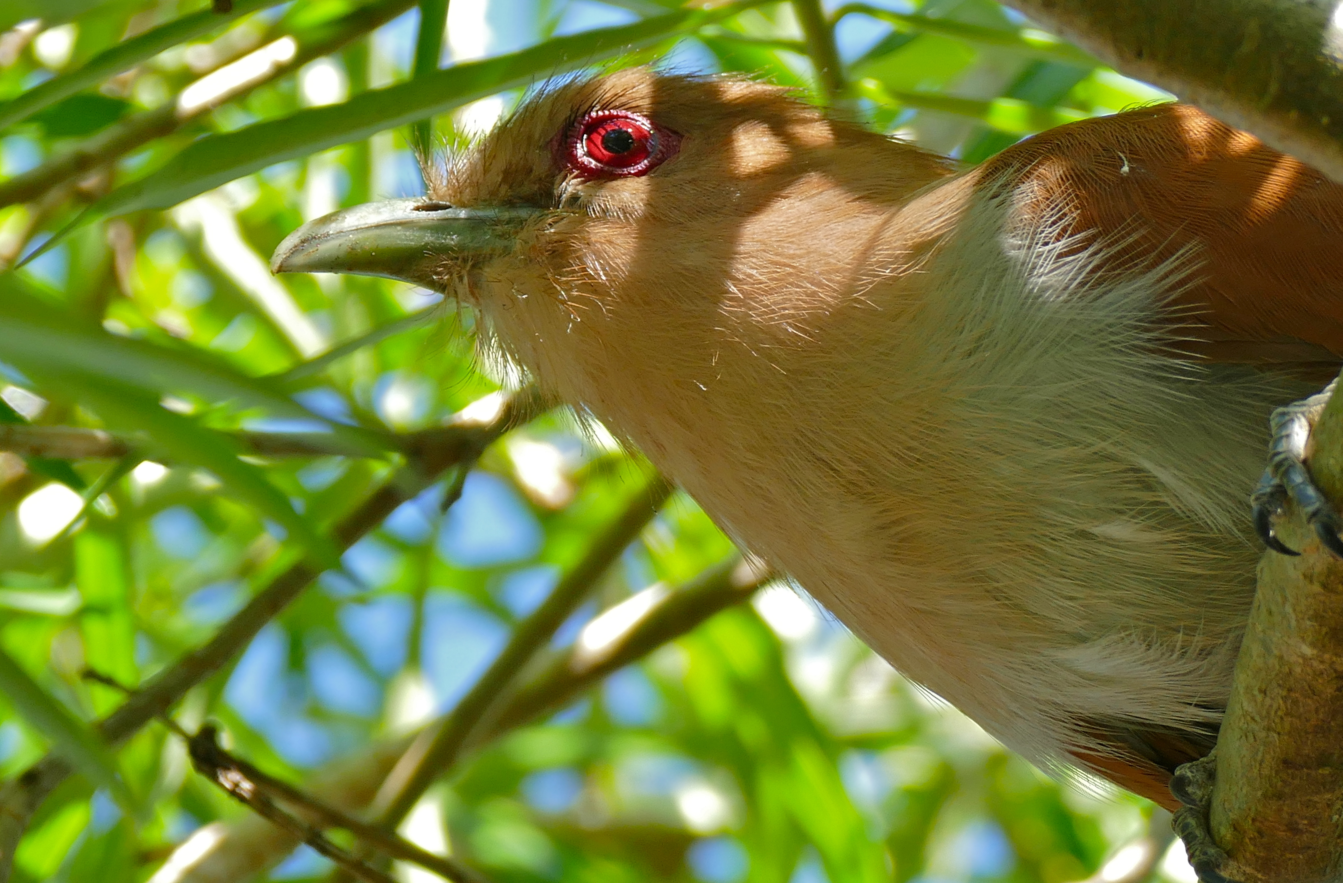 Pouso Alegre, Transpantaneira, Poconé, Mato Grosso, BRAZIL